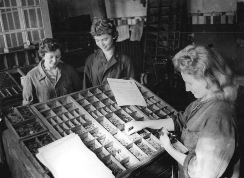 Jugendliche beim Setzen eines Informationblattes Zentralbild Zühlsdorf 3.9.1958 Vom Bauplatz der Jugend in der Wische. Auf dem Bauplatz der Jugend in der altmärkischen Wische sind insgesamt 165 km Gräben instandgesetzt worden. Bis zum 30. September 1958, dem letzten Tag des diesjährigen Wischeeinsatzes, sollen 175 km Wasserläufe in Ordnung gebracht sein. Seit dem 15. Mai, dem Beginn der großen Aktion in der altmärkischen Wische, sind von den jungen Sozialisten außer den Grabenaufräumungsarbeiten acht Rinderoffenställe, drei Silos und ein großer Düngerschuppen gebaut, sowie 14, 2 km Straßen instandgesetzt worden. Neben einer Vielzahl von Einsätzen in der Landwirtschaft halfen die Jugendlichen nach Feierabend noch insgesamt 18000 Stunden beim Nationalen Aufbauwerk. UBz: Der Operativstab des Bauplatzes der Jugend in der Wische gibt eine Wochenzeitung sowie ein tägliches Informationsblatt heraus. Dieses Informationsblatt wird von Setzer- und Druckerlehrlingen der Volksstimme Magdeburg in einer kleinen Druckerei in Seehausen hergestellt. Setzerlehrling Sigrid Mühlberg (rechts) beim Absetzen des täglichen Informationsblattes.